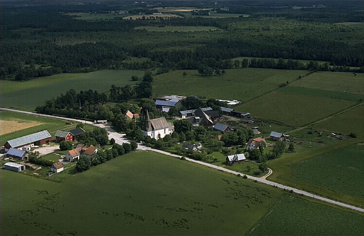 Motiv: Gerums kyrka Nyckelord: Flygbilder, Riksintressen Kategori: KyrkbyGerums kyrka